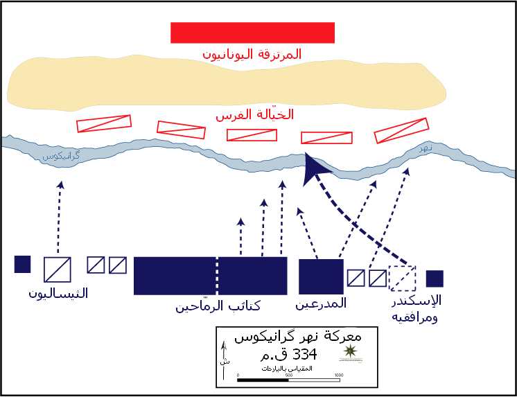 مخطط معركة نهر گرانیکوس بين الإسكندر الأكبر والفرس.